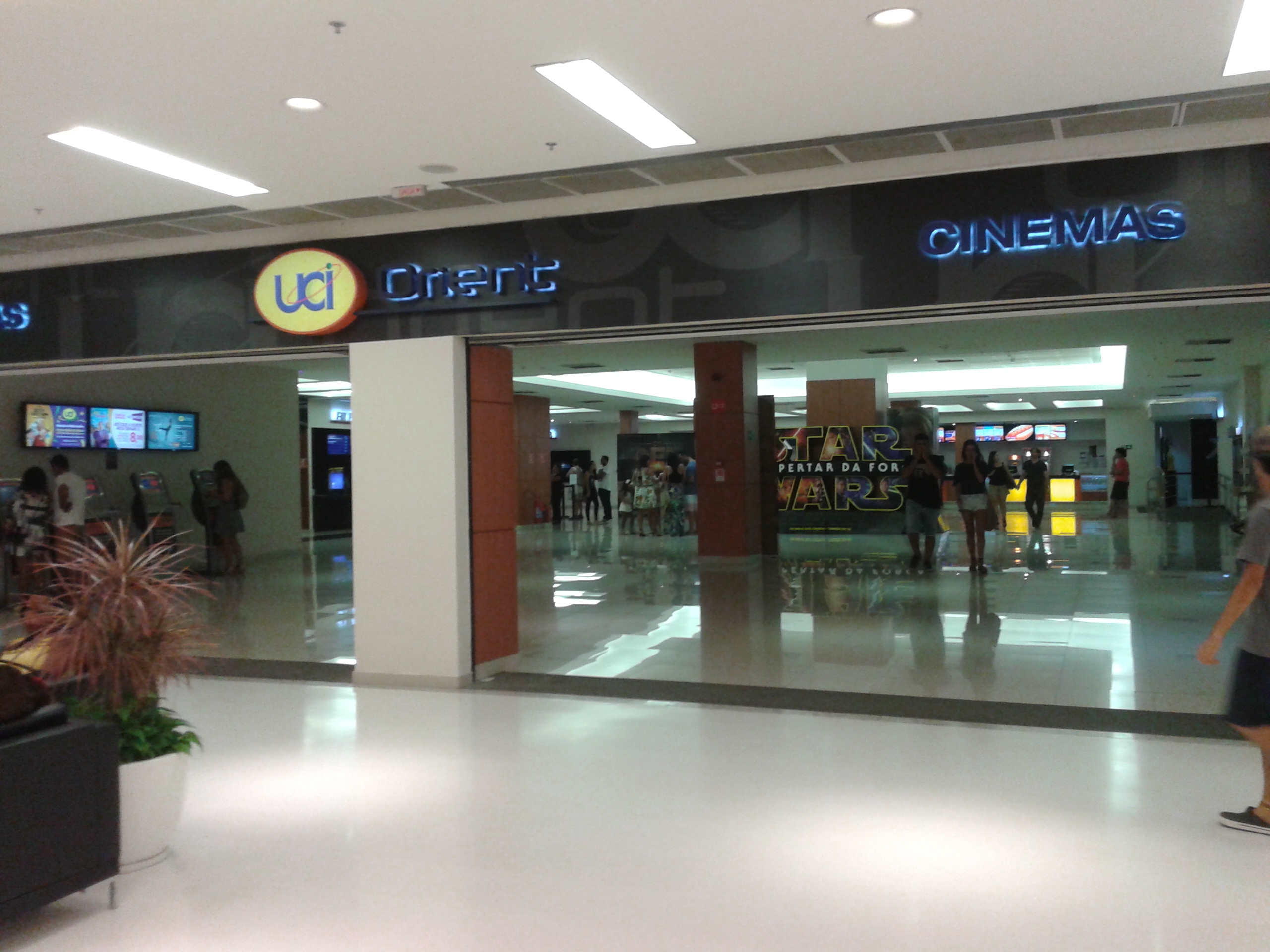 Fachada do UCI Orient Shopping Barra em Salvador, janeiro de 2016